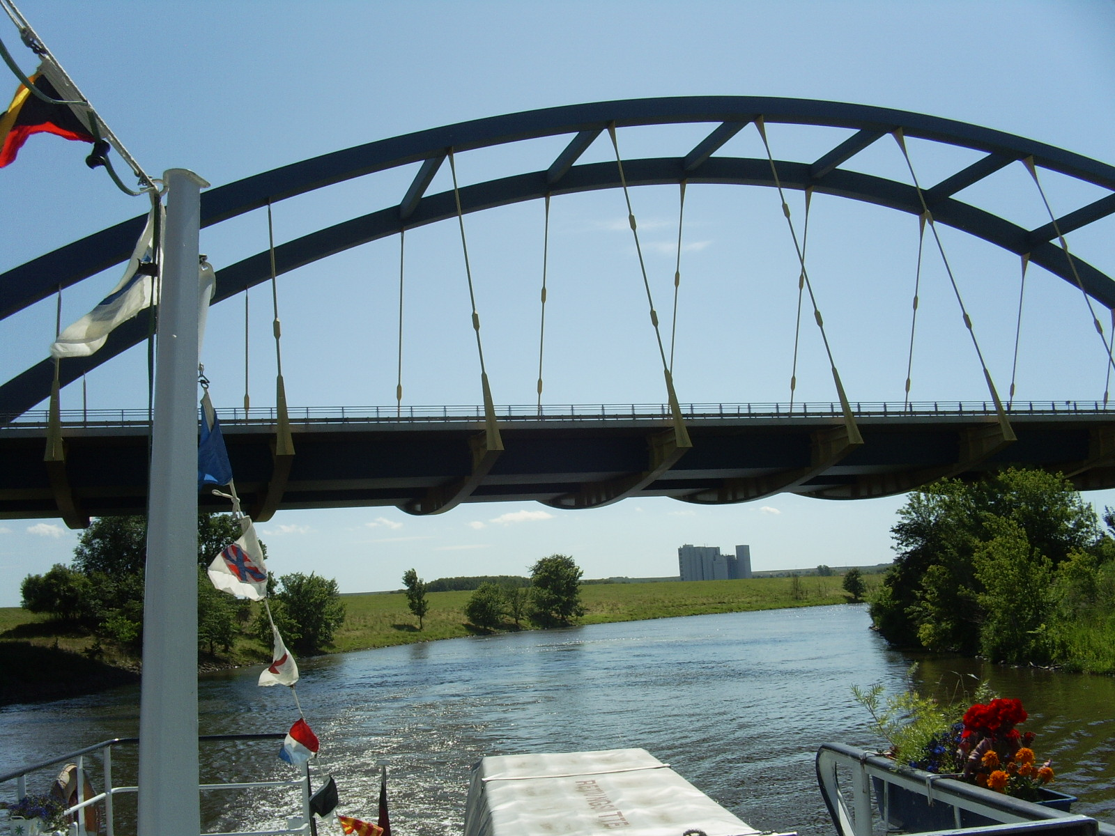 Autobahnbrücke A14, Saale bei Plötzkau, hinten neue Mühle Alsleben